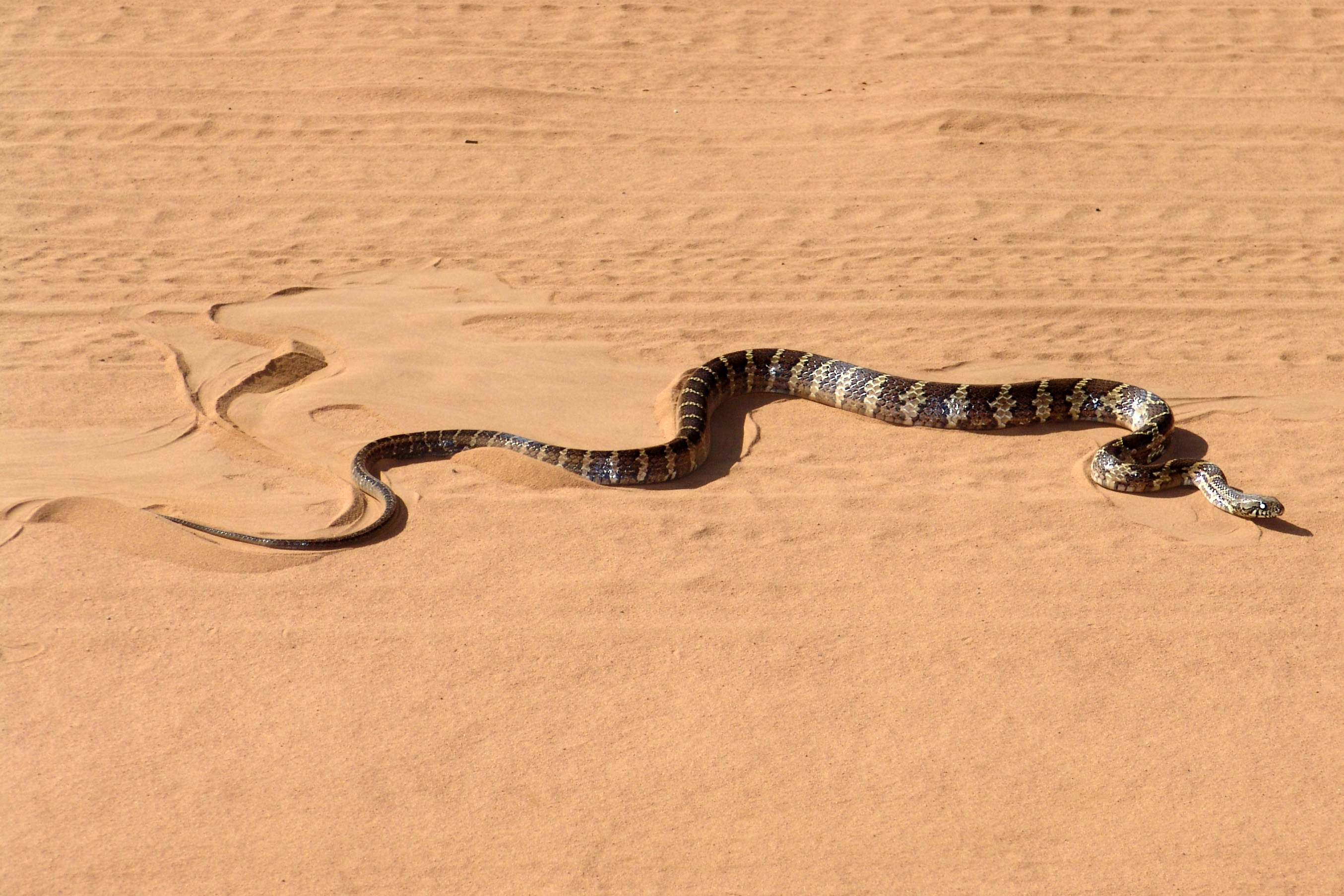 Cobra (jibóia) atravessando estrada de terra a cerca de 6 quilômetros de Avaré, provavelmente com mais ou menos 200 centímetros de comprimento-não tive coragem de medir!!!